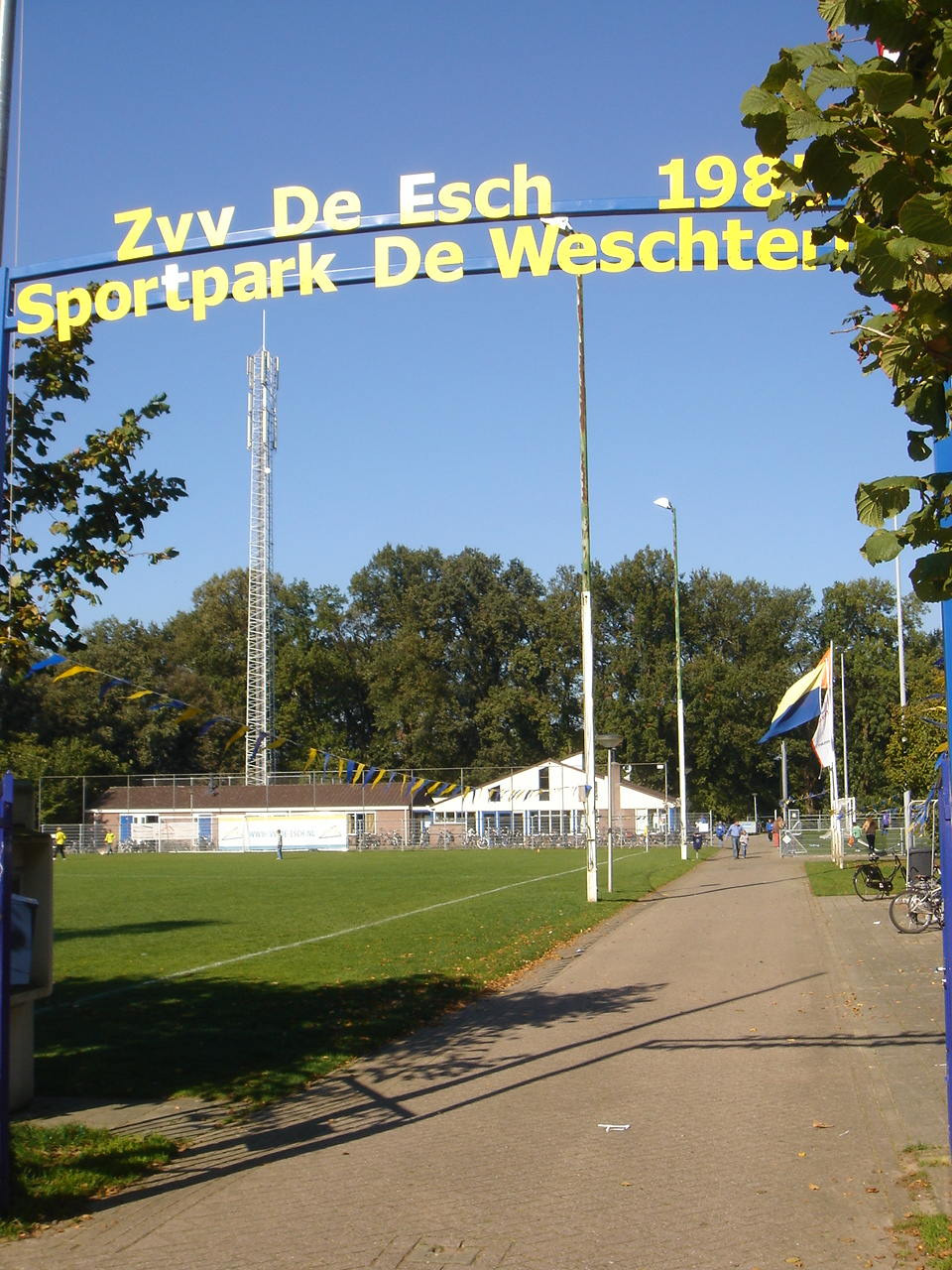 Entree